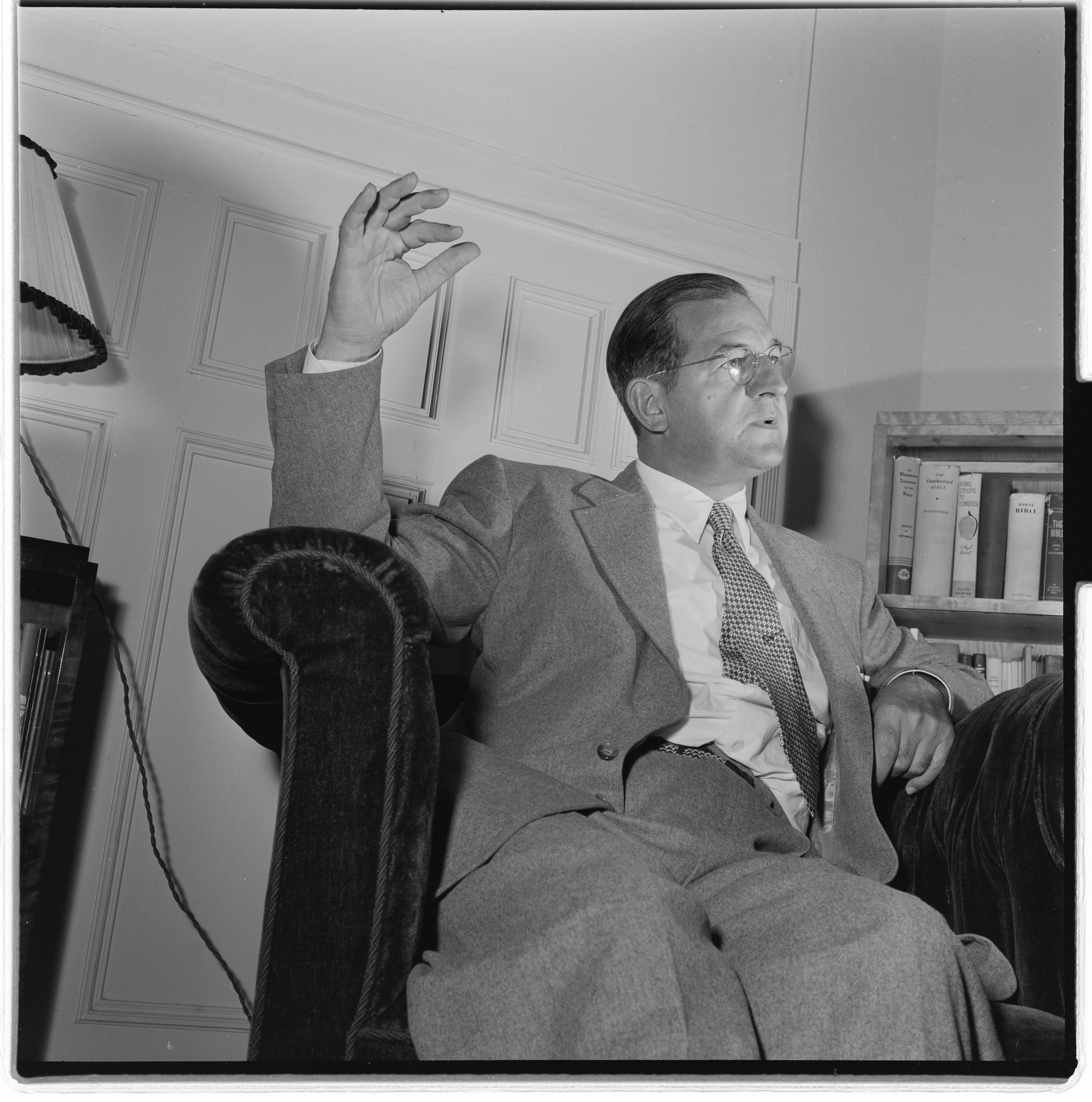 Bildet er hentet fra Arkivverket. Nathan Knorr, Jehovas vitne.NÅ nr. 38,1955 Arkivinstitusjon : Riksarkivet Arkivnavn : Billedbladet NÅ Sted : Norge, Ukjent, Ukjent, Emneord: portrett, mann, Jehovas vitner Avbildet: Knorr, Nathan Homer